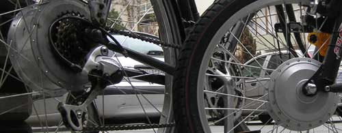 Nabenmotoren eigene Aufnahme